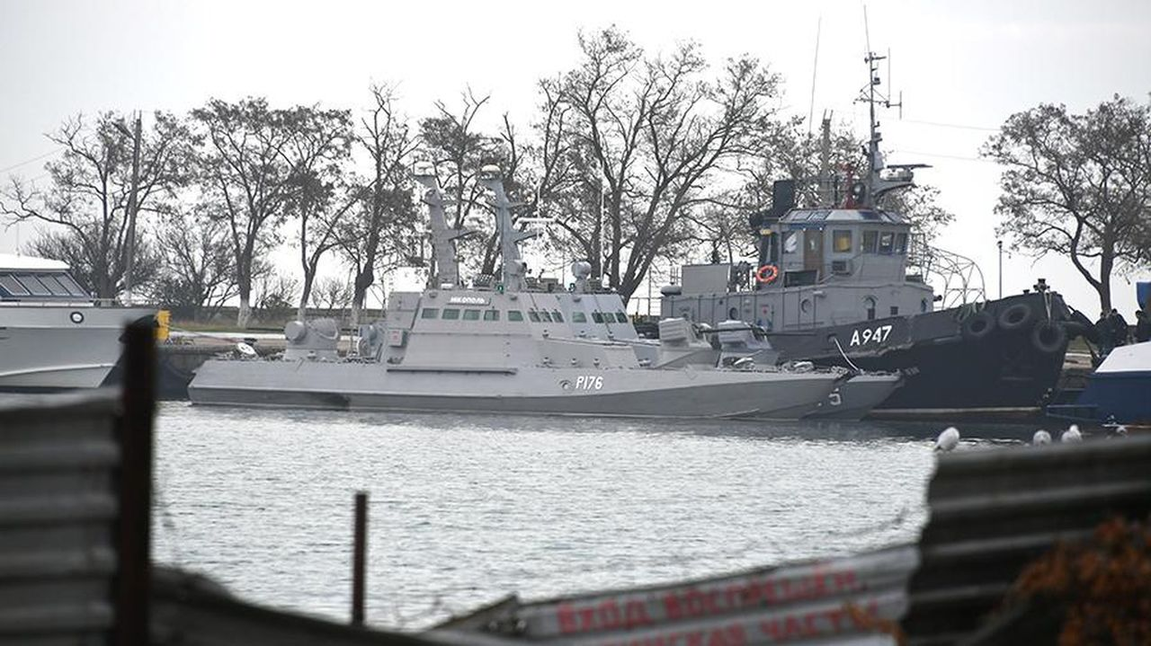 Задержанные корабли на рейде в Керчи